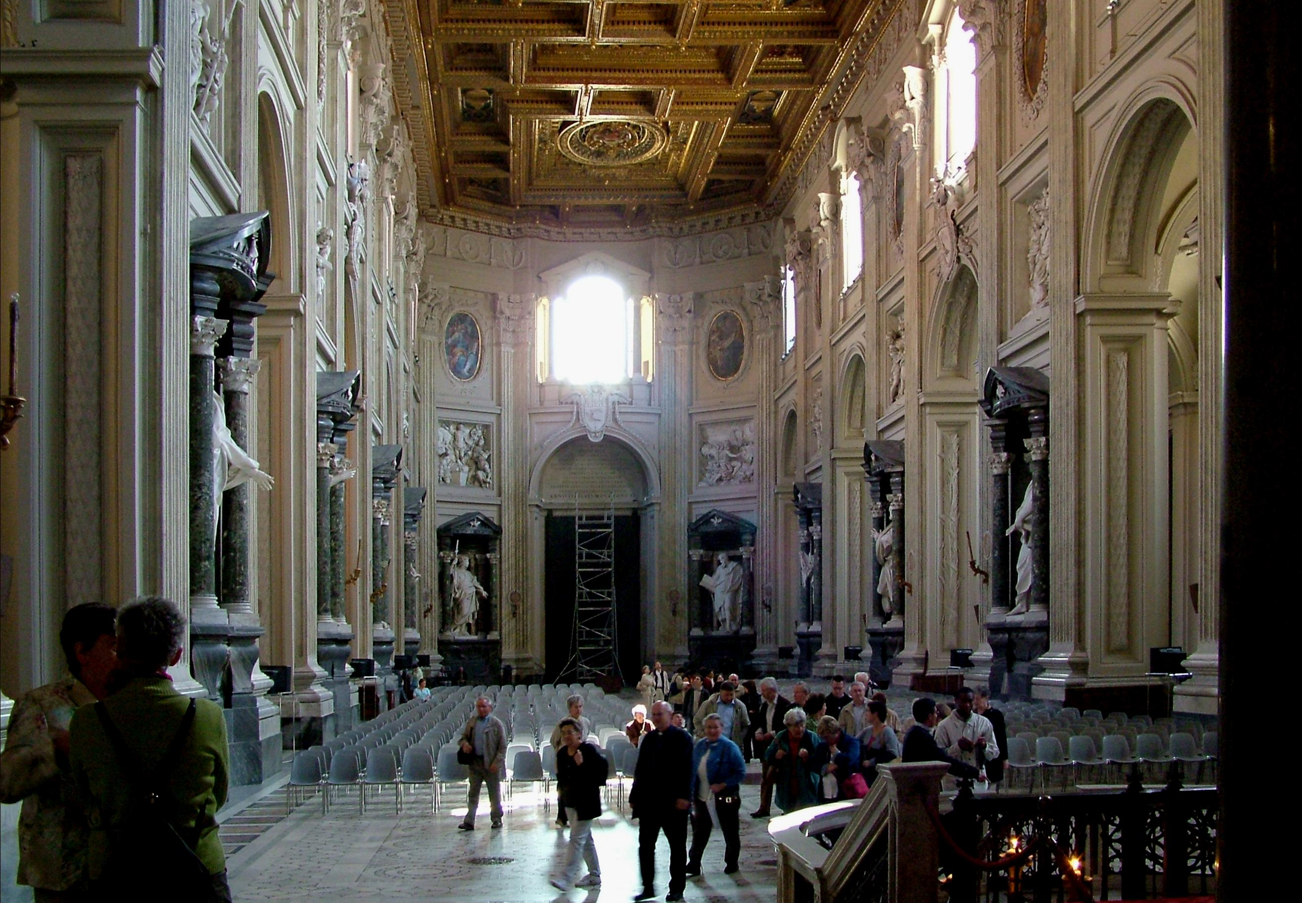 A főszékesegyház Főhajója